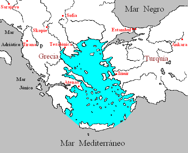 mapa dibujado por M.Romero Schmidtke para la Enciclopedia Libre y la wikipedia